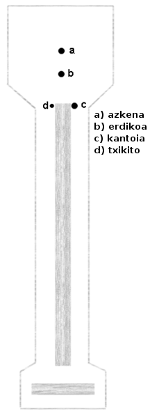 Gesaltzako bola azaltzeko eginiko grafikoa